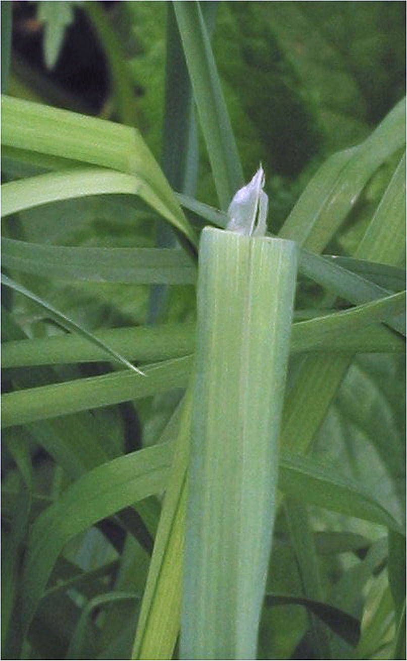 Dactylis glomerata Kropaar ligula (tongetje)